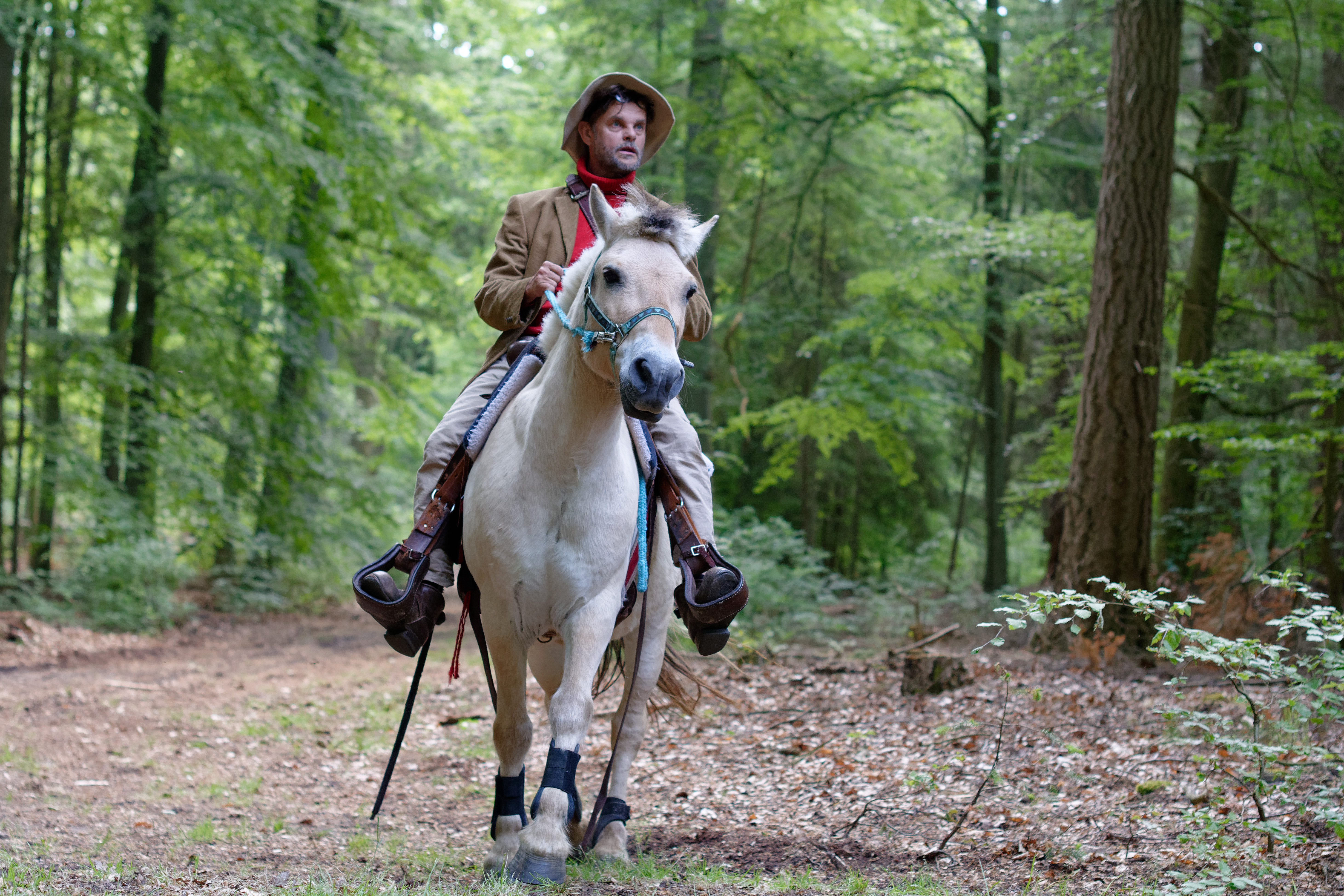 Lars Rudolph bei der Theater Performance "Wilde Welt Wald" im Mai 2018. Wilde Welt Wald, war ein Projekt von BBM (Beobachter der Bediener von Maschinen), der Galerie Divan sowie dem Biosphären‐Reservat Flusslandschaft Elbe, im Dreiländereck: Brandenburg, Mecklenburg‐Vorpommern und Niedersachsen, im Mai 2018. (